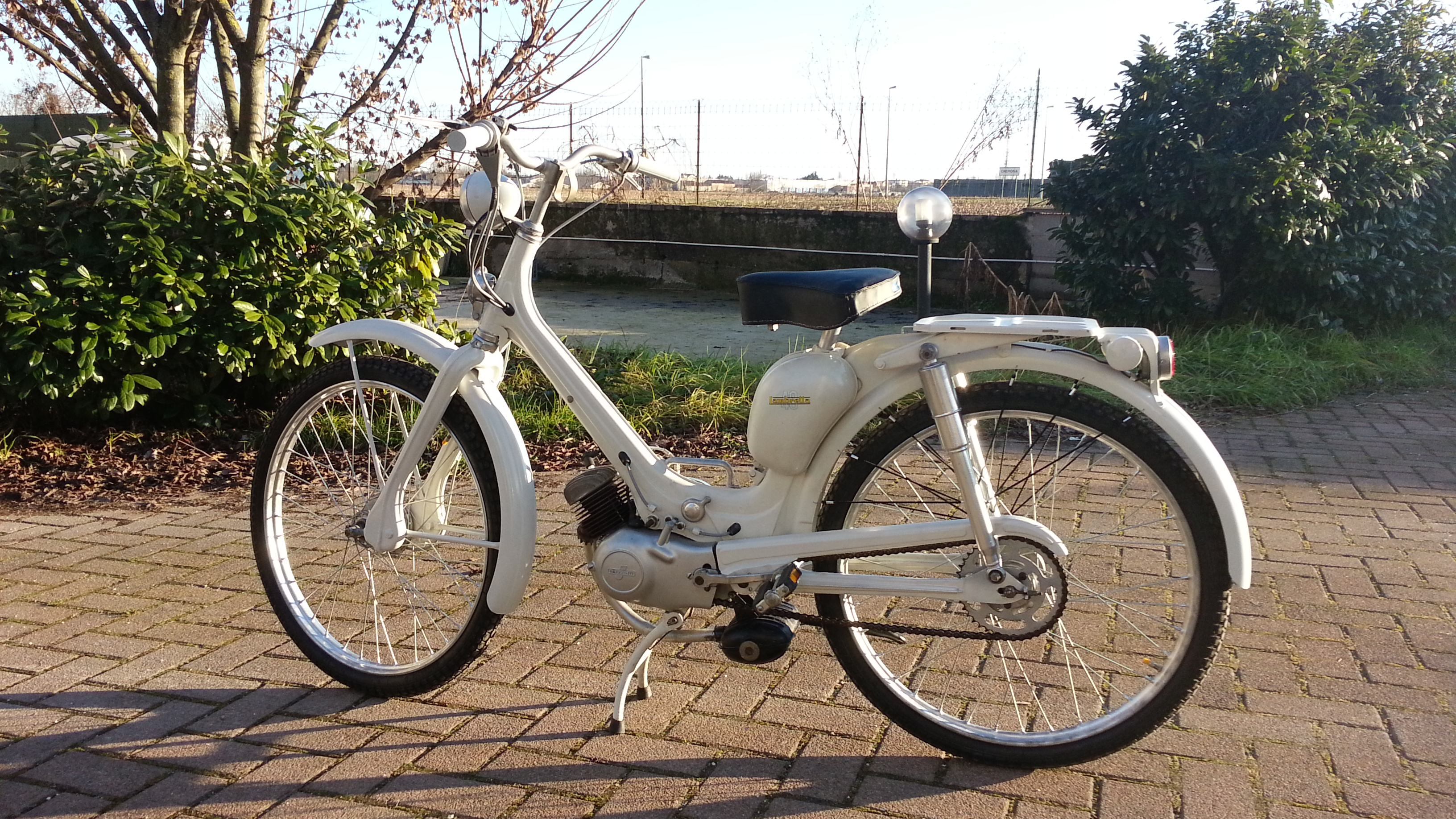 Lambretta 48, 1960, appena restaurata